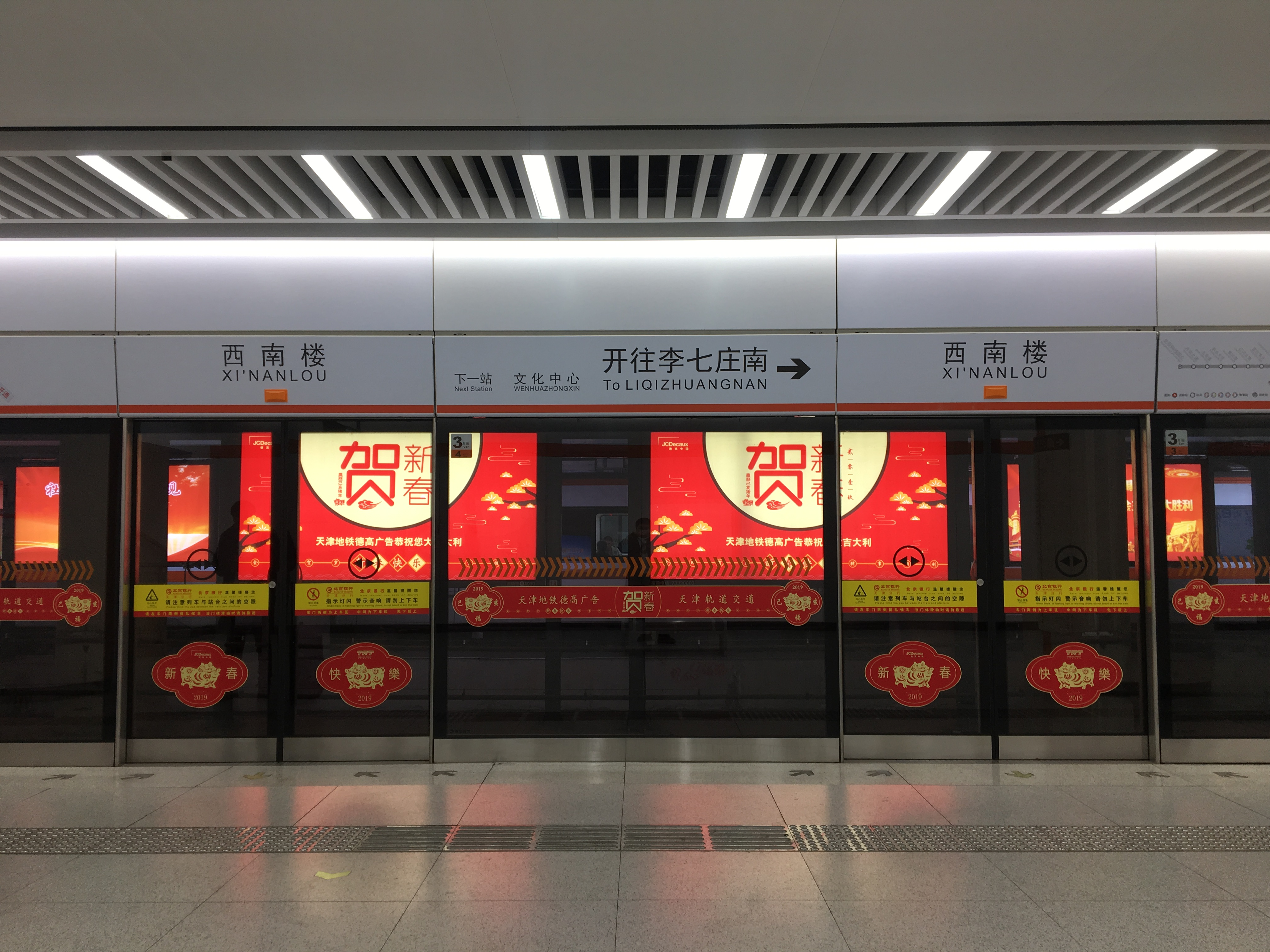 天津地铁西南楼站5号线站台